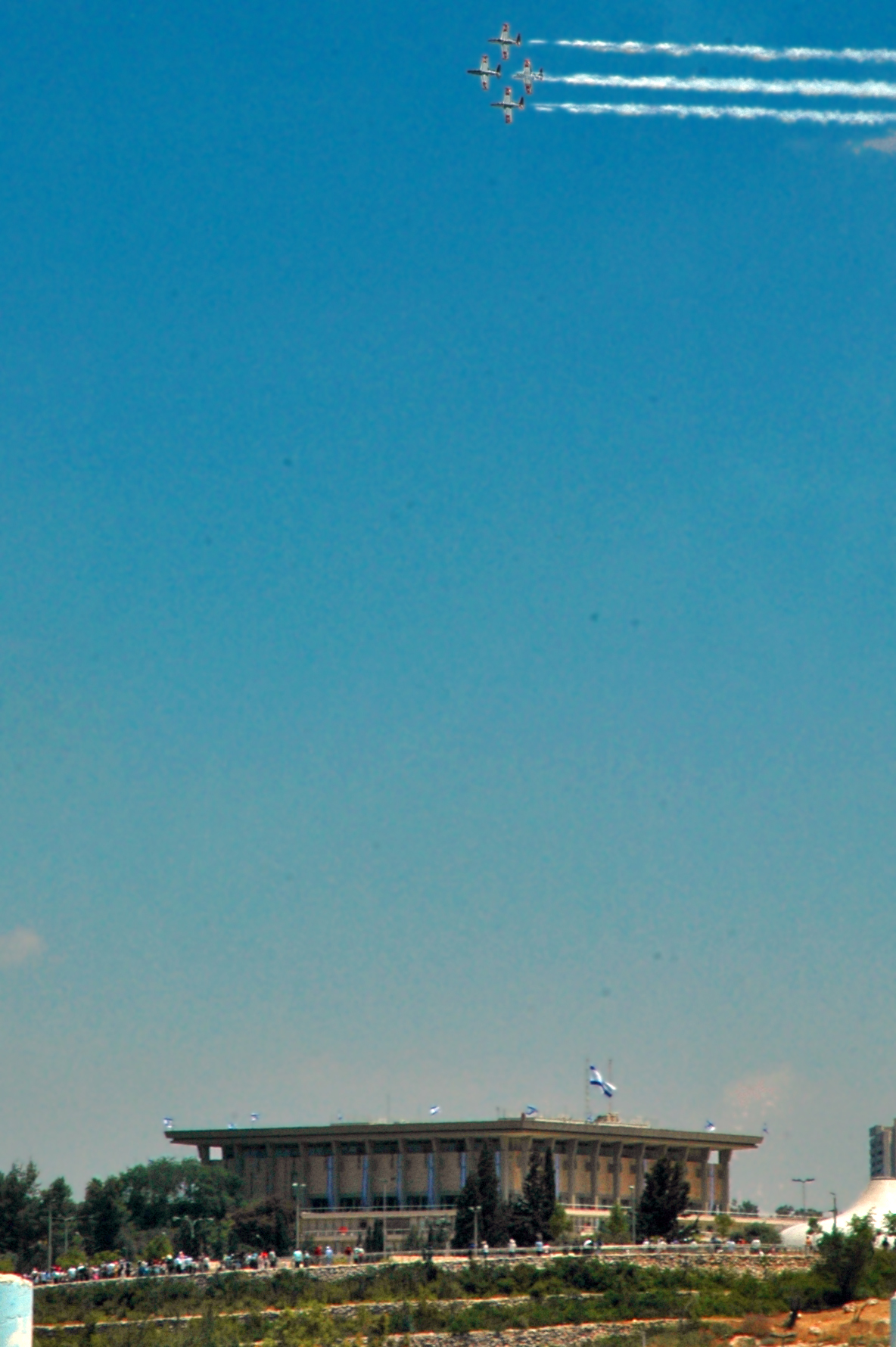 מטס מעל הכנסת לחגיגות ה60